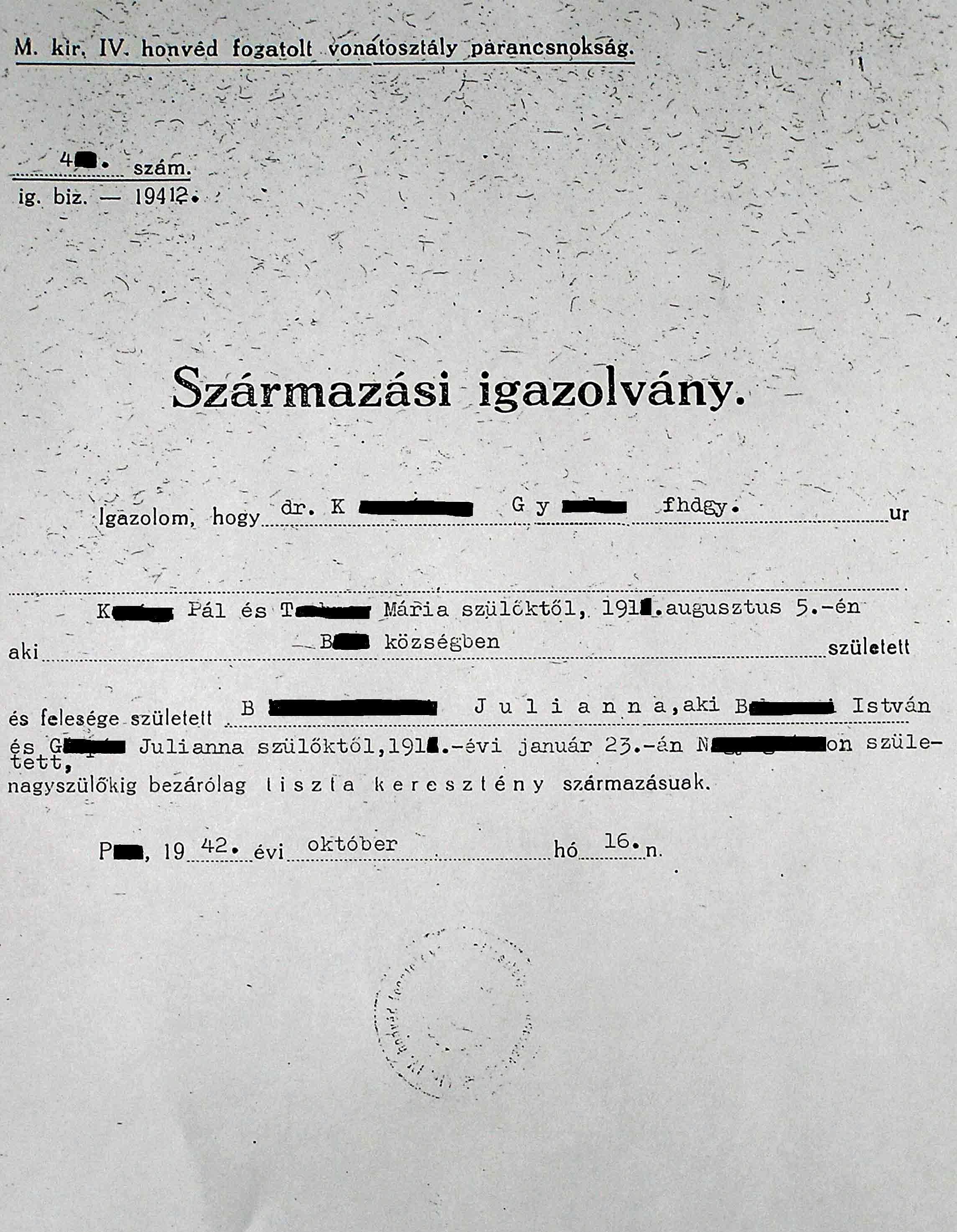 A Magyar Kir. Honvédségnél 1942-ben végzett, előmenetelhez szükséges, két generációra kiterjedő származási vizsgálat jegyzőkönyve. Maga a vizsgálat egy szokásos formaság volt, hisz a Honvédség tisztjeinek az erről szóló törvények megjelenése idején anyakönyvi kivonatokkal és egyéb dokumentumokkal kellett vallási és nemzetiségi hovatartozásukat igazolni.